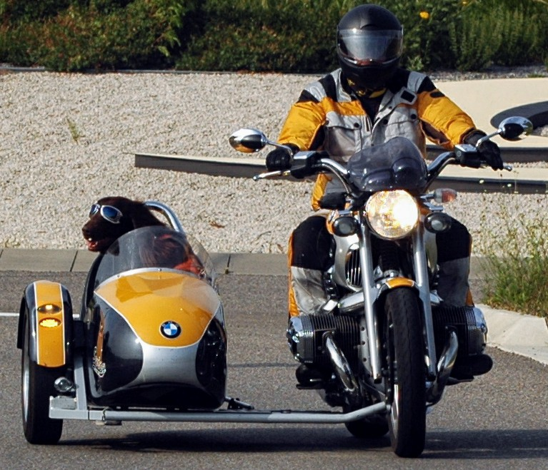 Sinshreim: Motorradgespann BMW mit ein Hund